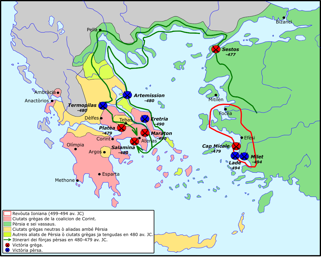 Guèrras Medicas de 490 a 477 av. JC